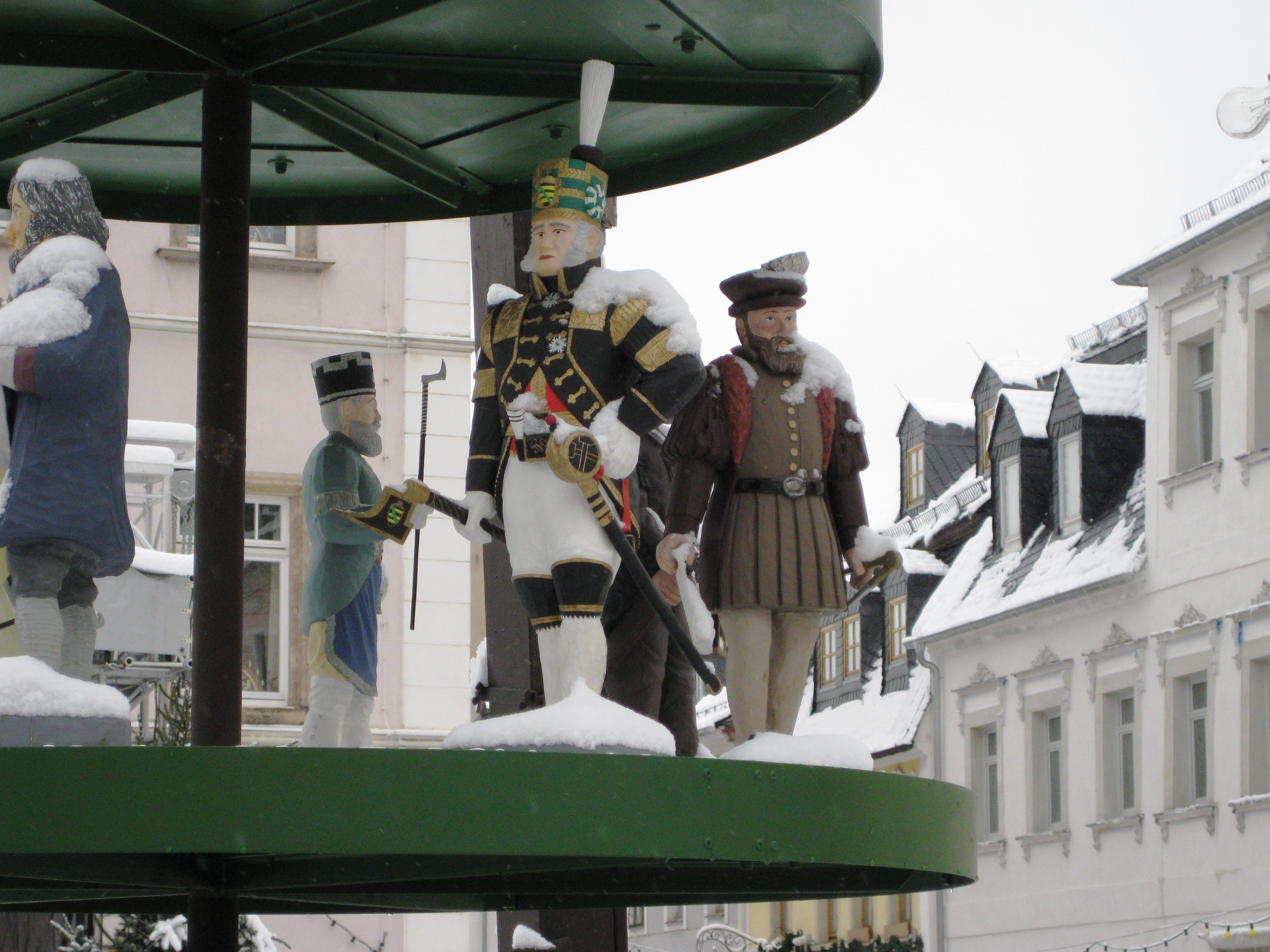 Weihnachtsmarkt